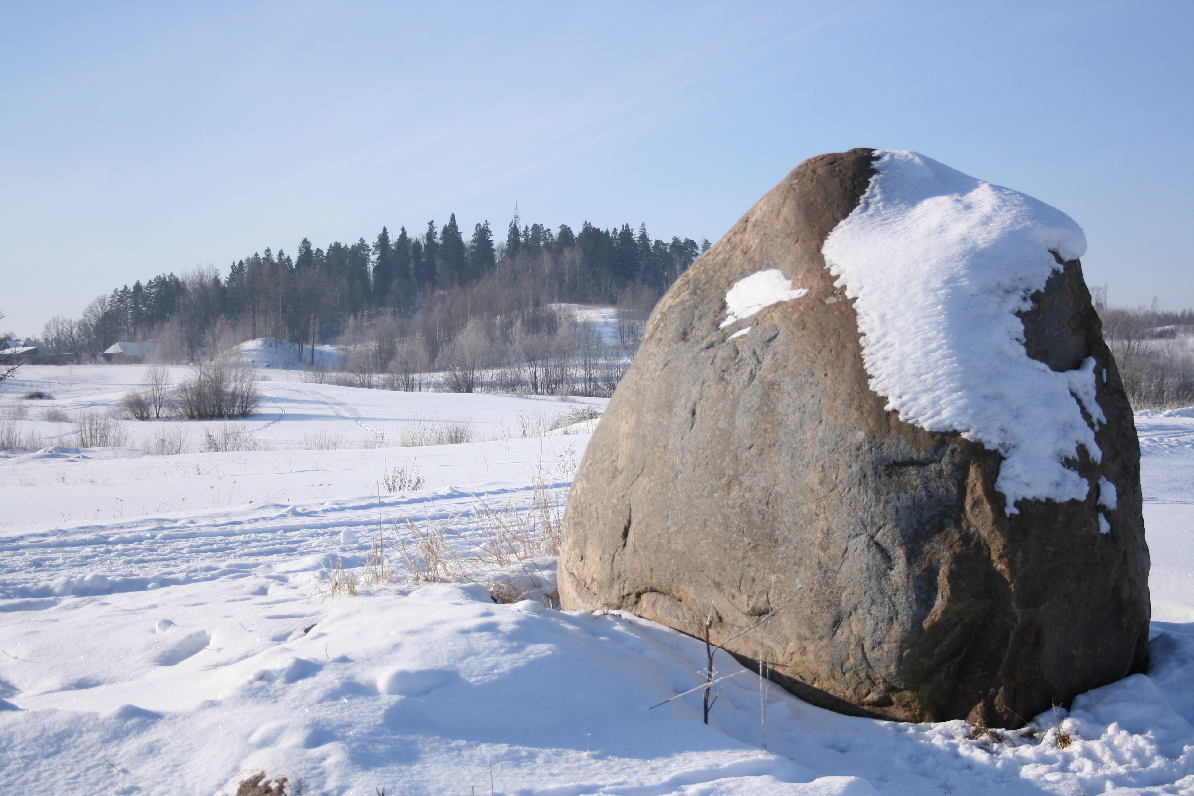 Tālumā Kārtenes pilskalns